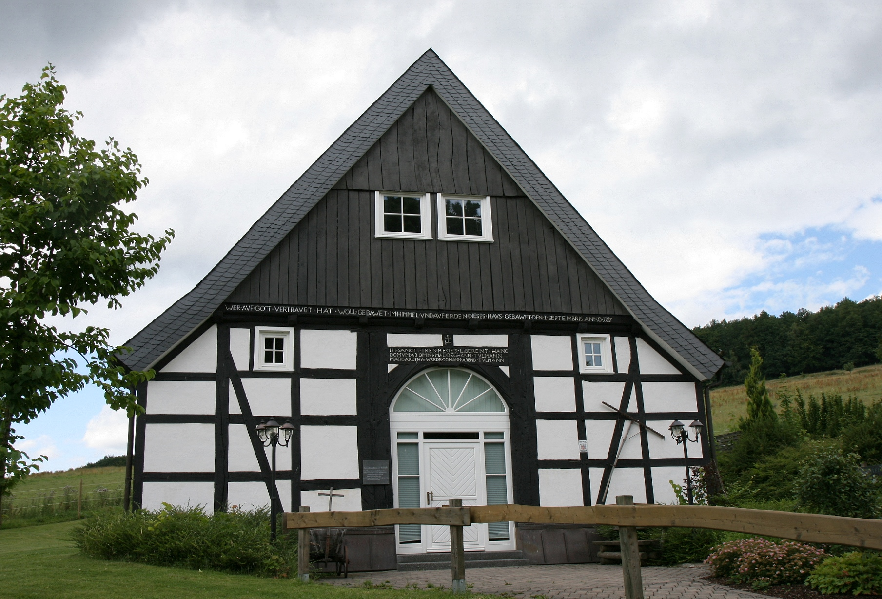 Heimatmuseum „Alte Mühle“ im Müllerhaus „Gevelinghäuser Mühle“ in Olsberg-Gevelinghausen. Vierständerhaus, erbaut 1717, 1985 Übernahme durch Heinz Kettler aus dem Besitz von Wendt-Papenhausen, 1999 erfolgte die Umsetzung und der Wiederaufbau.